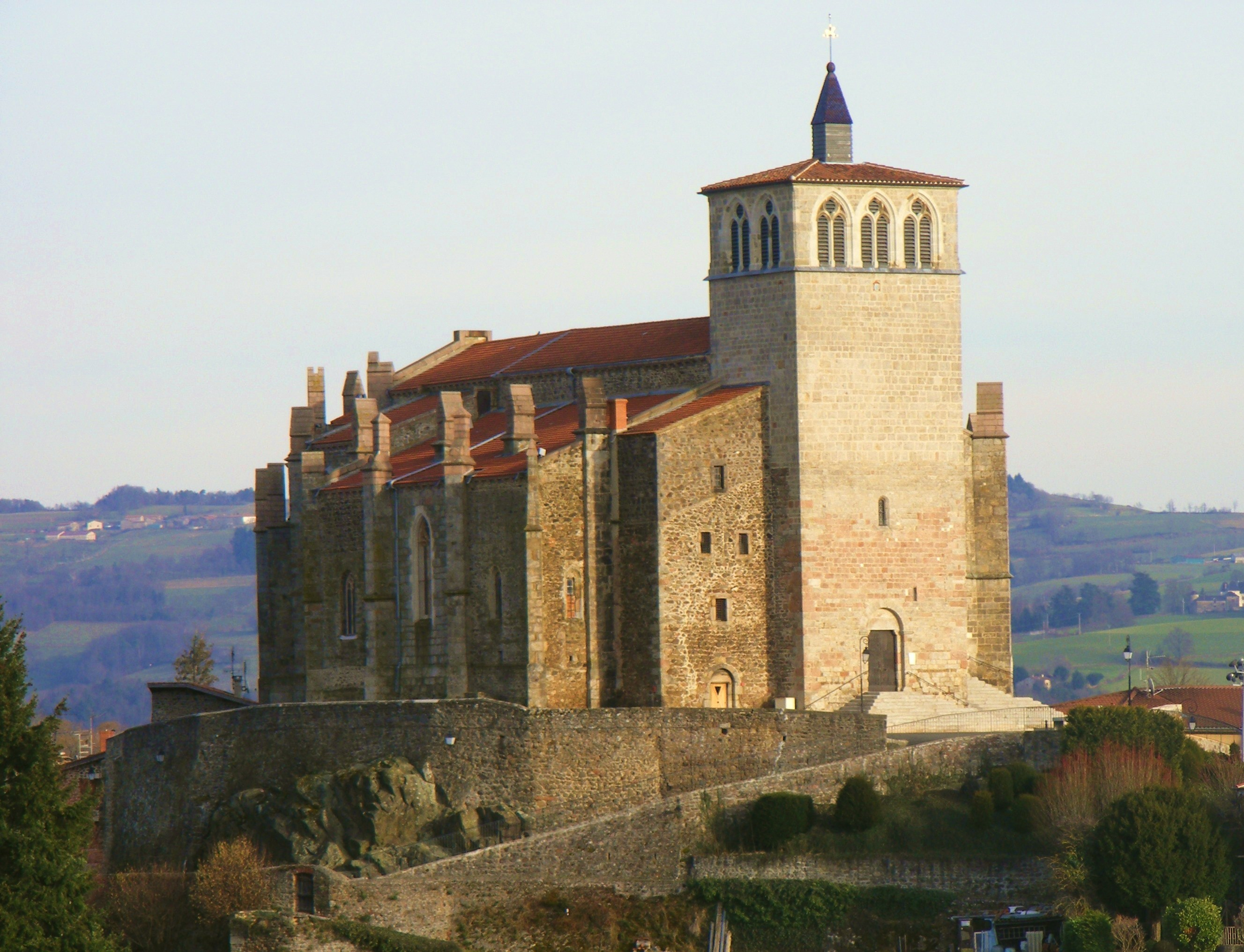 Vue extérieure depuis le Nord-Ouest